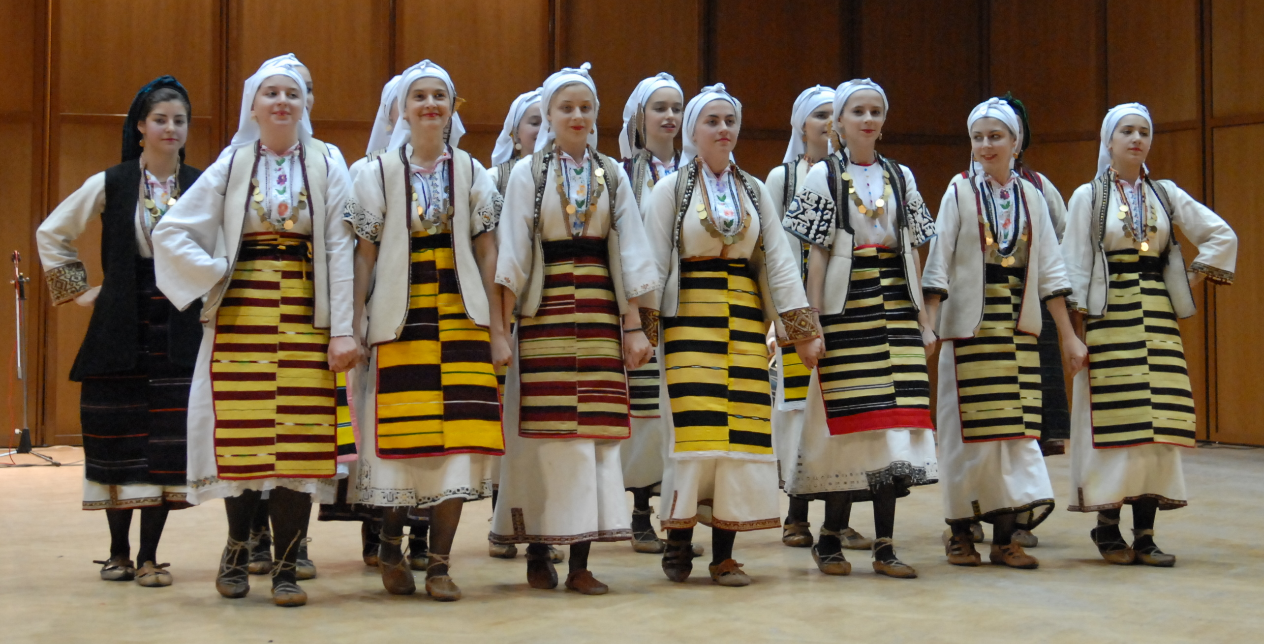 "Копачија" - игри од кичевскиот крај